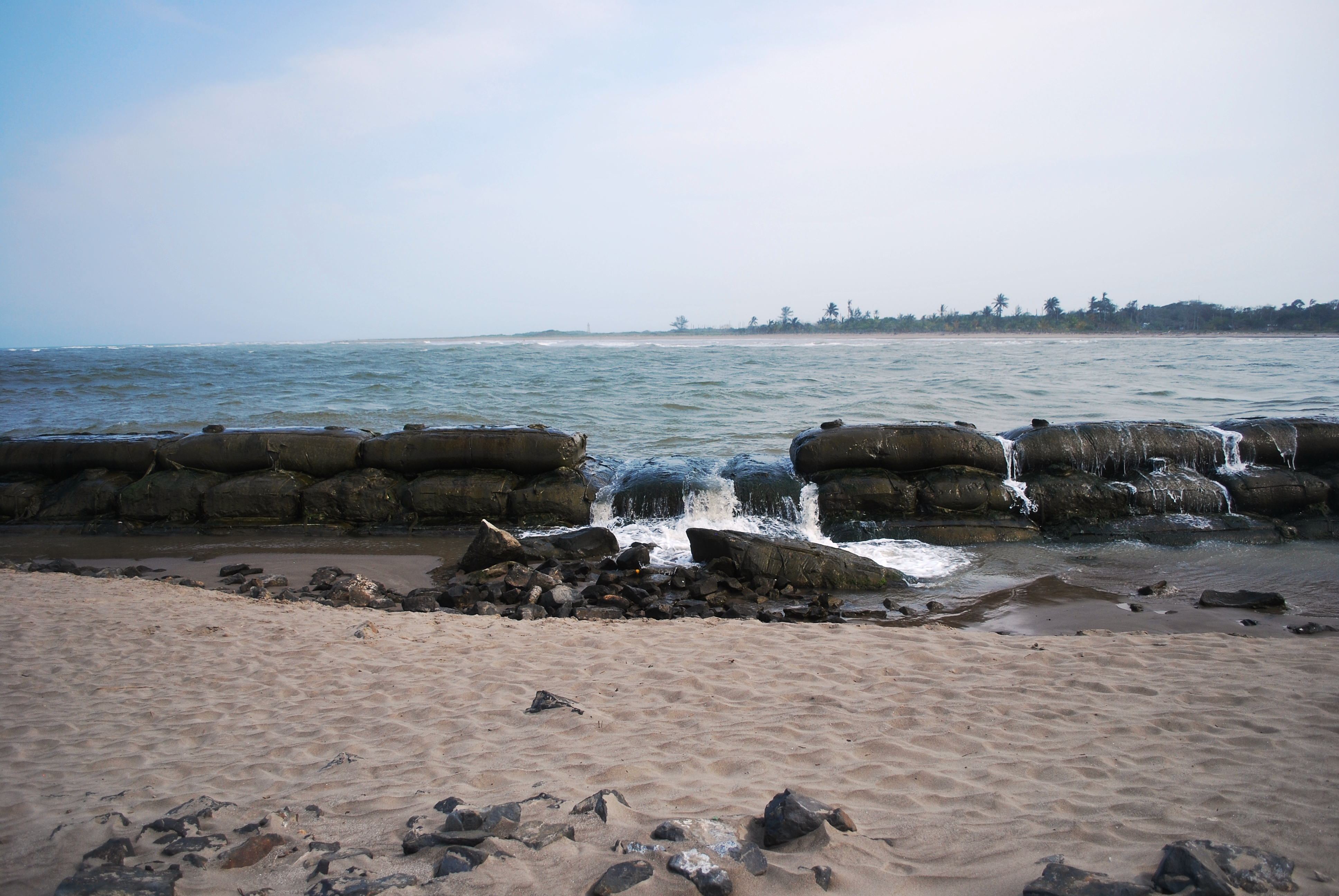 Sea breaker at the mouth of the Tecolutla River in Tecolutla, Veracruz